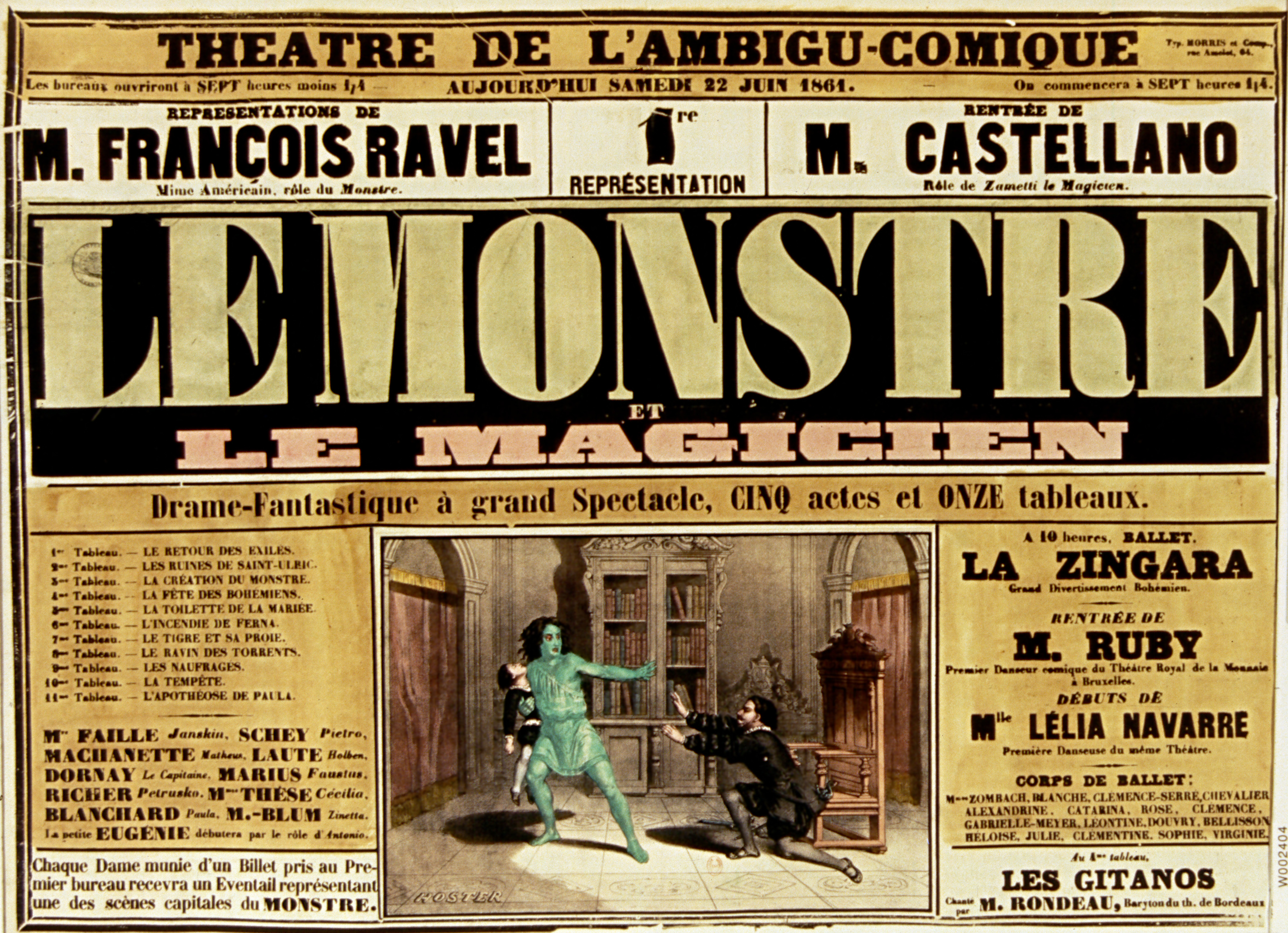 Théâtre de L'Ambigu comique... Aujourd'hui samedi 22 juin 1861... Représentations de M. François Ravel, mime américain, rôle du monstre. Rentrée de M. Castellano, rôle de Zametti le magicien. Première représentation : Le Monstre et le magicien. Drame fantastique à grand spectacle, cinq actes et onze tableaux...[de Ferdinand Dugué] affiche